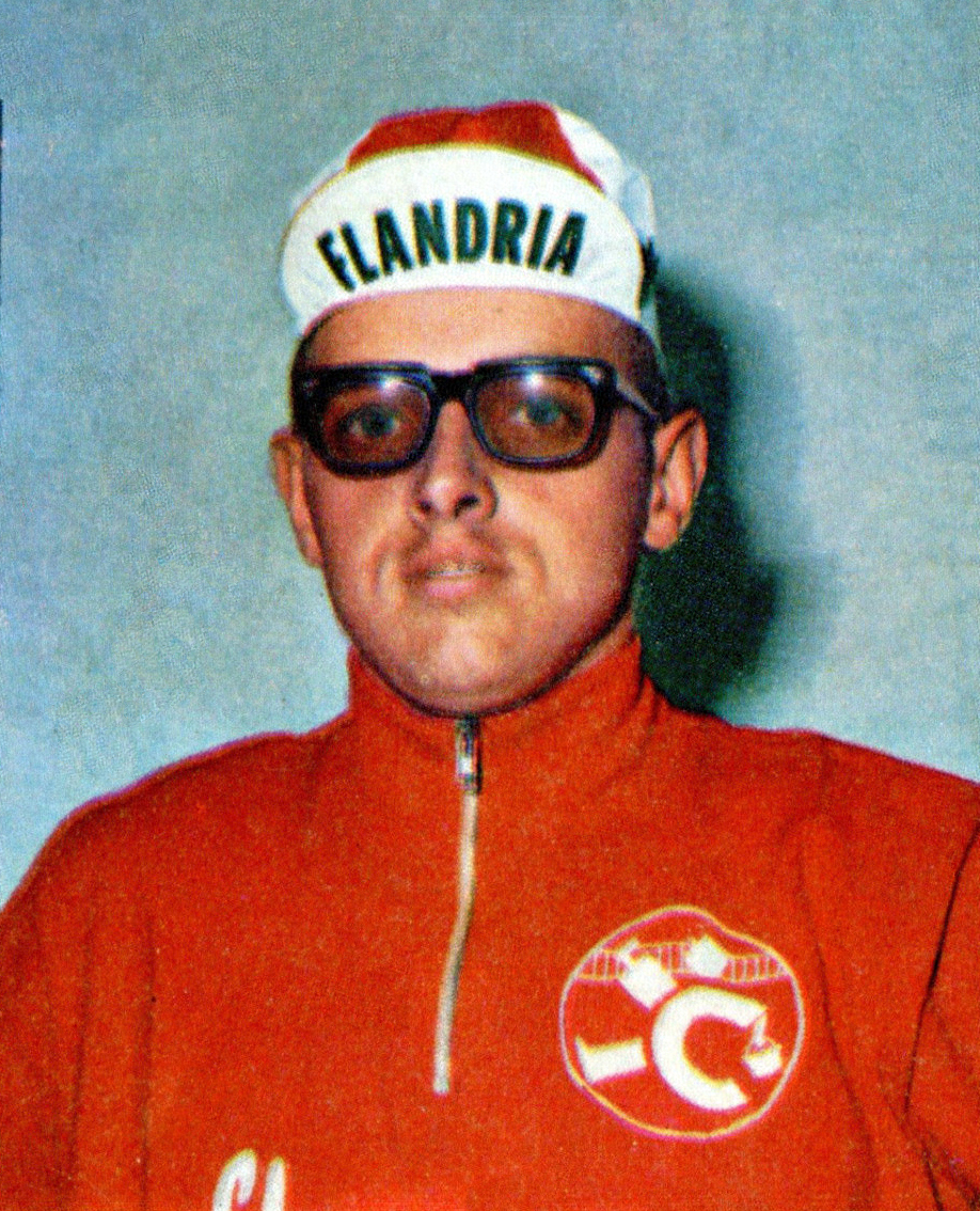 Figurina/Sticker CAMPIONI DELLO SPORT 1968/69-n. 188 - W. DAVID